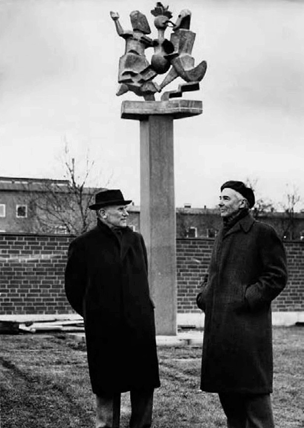 Skulpturen »Det entomologiska kvinnorovet«, skapad av skulptören Eric Grate (t h), satte myror i huvudet på mer än en KI-professor 1958 när den skulle resas för att pryda ingången till Sveriges stoltaste lärosäte. Förslaget att köpa statyn kom från KI:s arkitekt Ture Ryberg (t v).